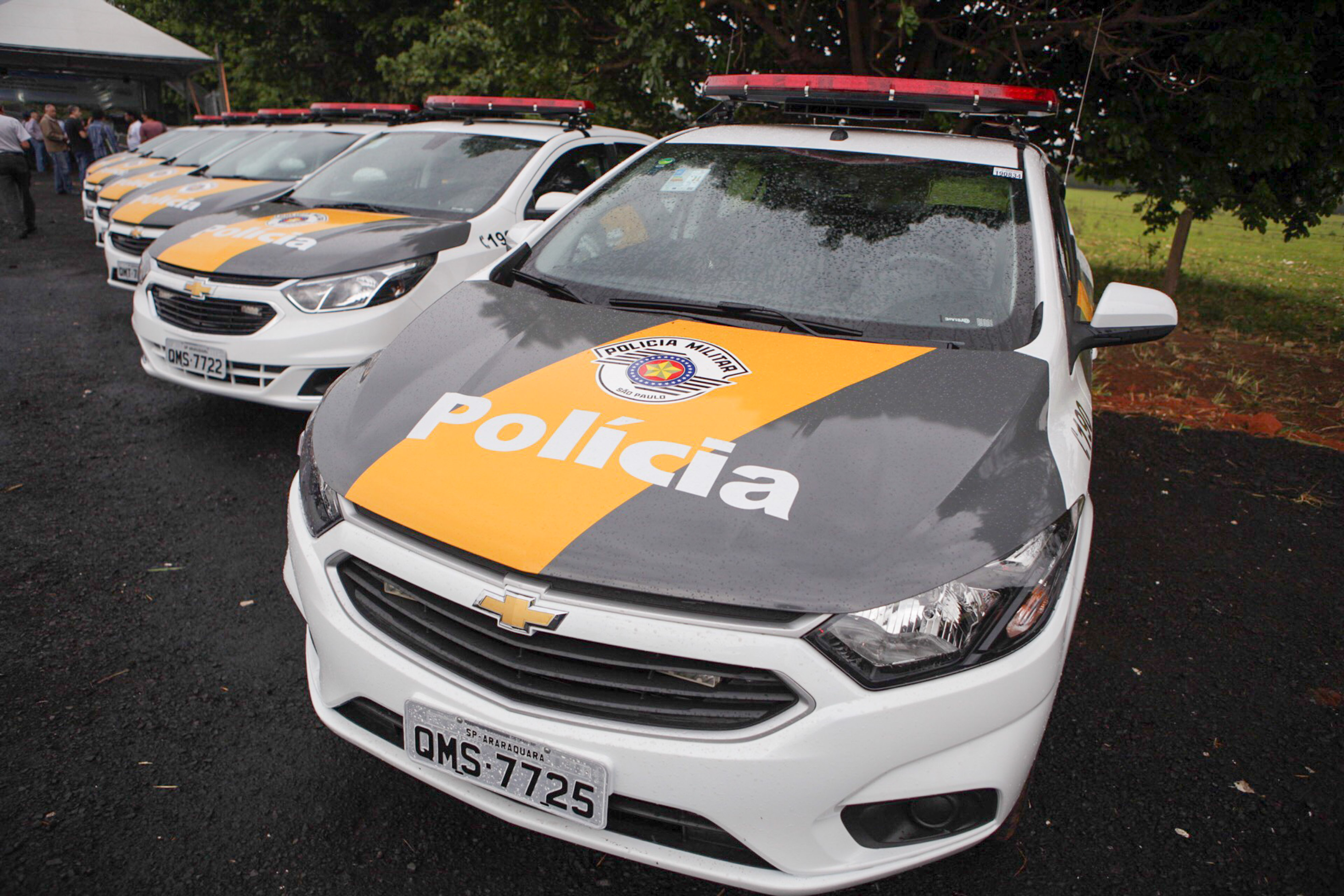 O Governador Geraldo Alckmin, participa do início das obras da Duplicação da SP-333 e entrega de viaturas para Polícia Rodoviária e assinatura de contratos do IAMSPE.DATA 21/10/2017. LOCAL: Marília/SP. FOTO: Daniel Guimarães